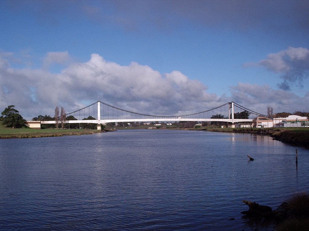 Puente colgante Hipólito Yrigoyen postal de Necochea y Quequen desde 1929.